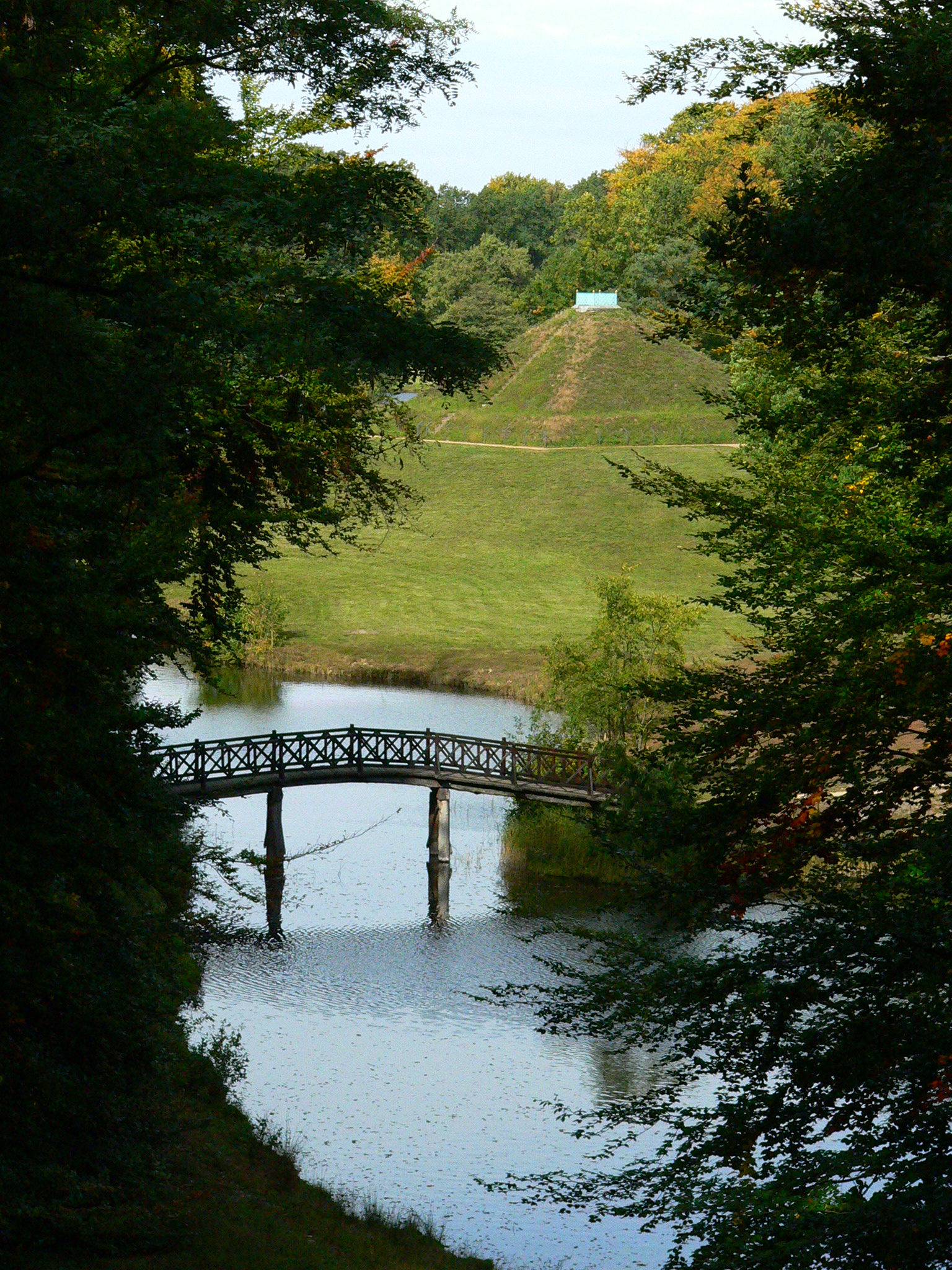 Cottbus - Branitzer Park Bruecke